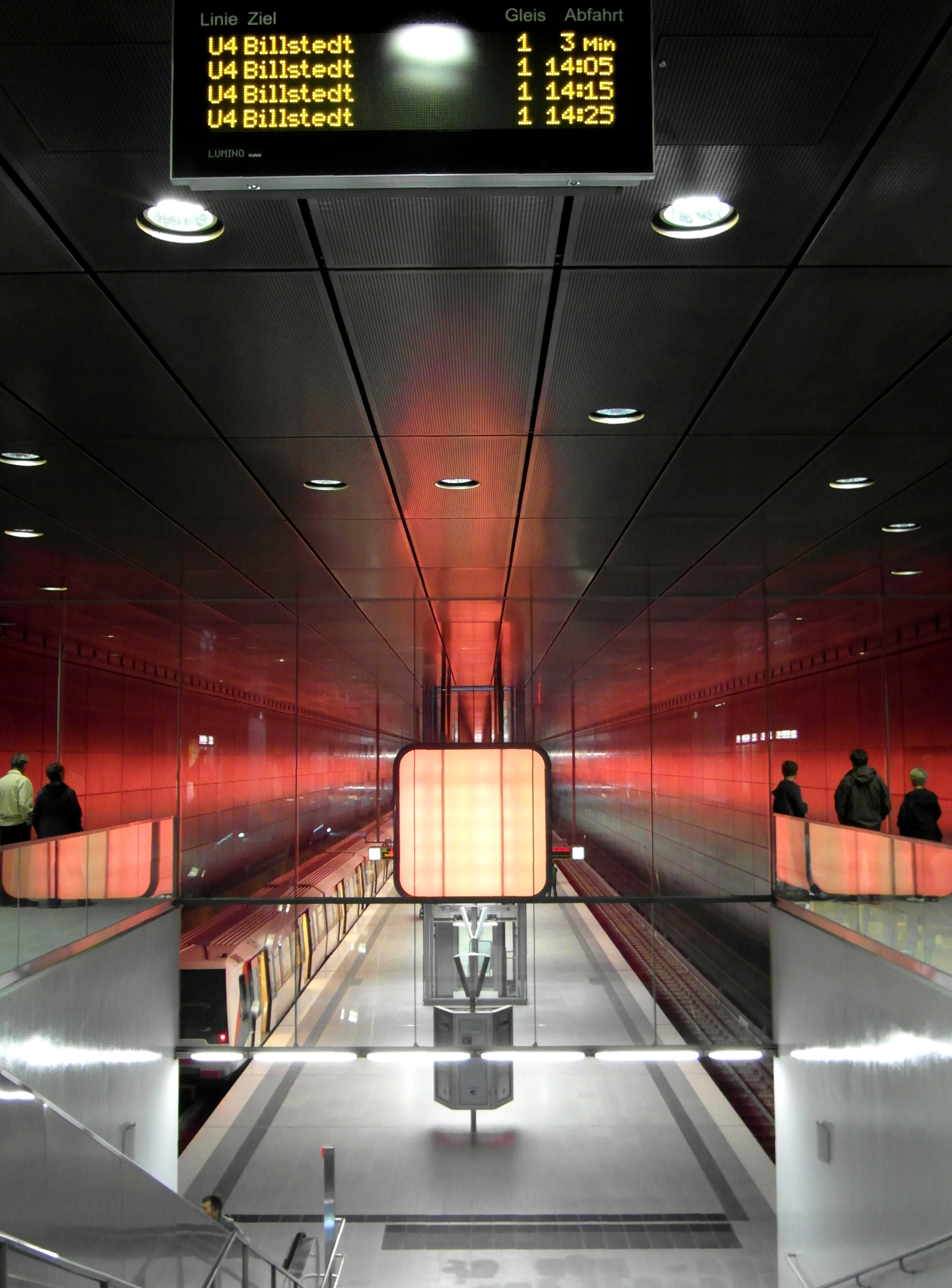 U-Bahnhof HafenCity Universität in Hamburg